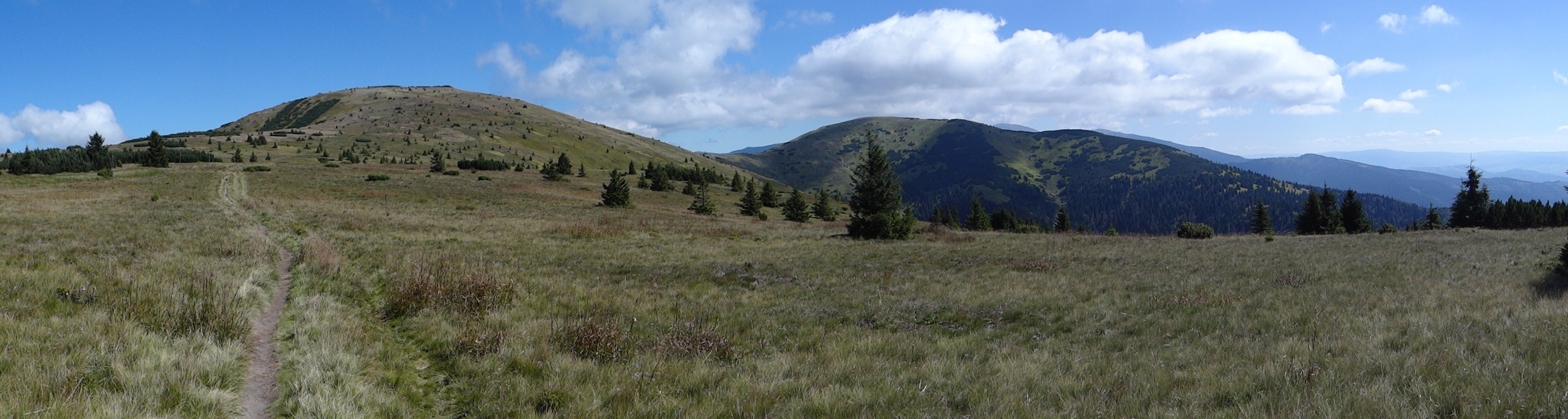 Veľká hoľa